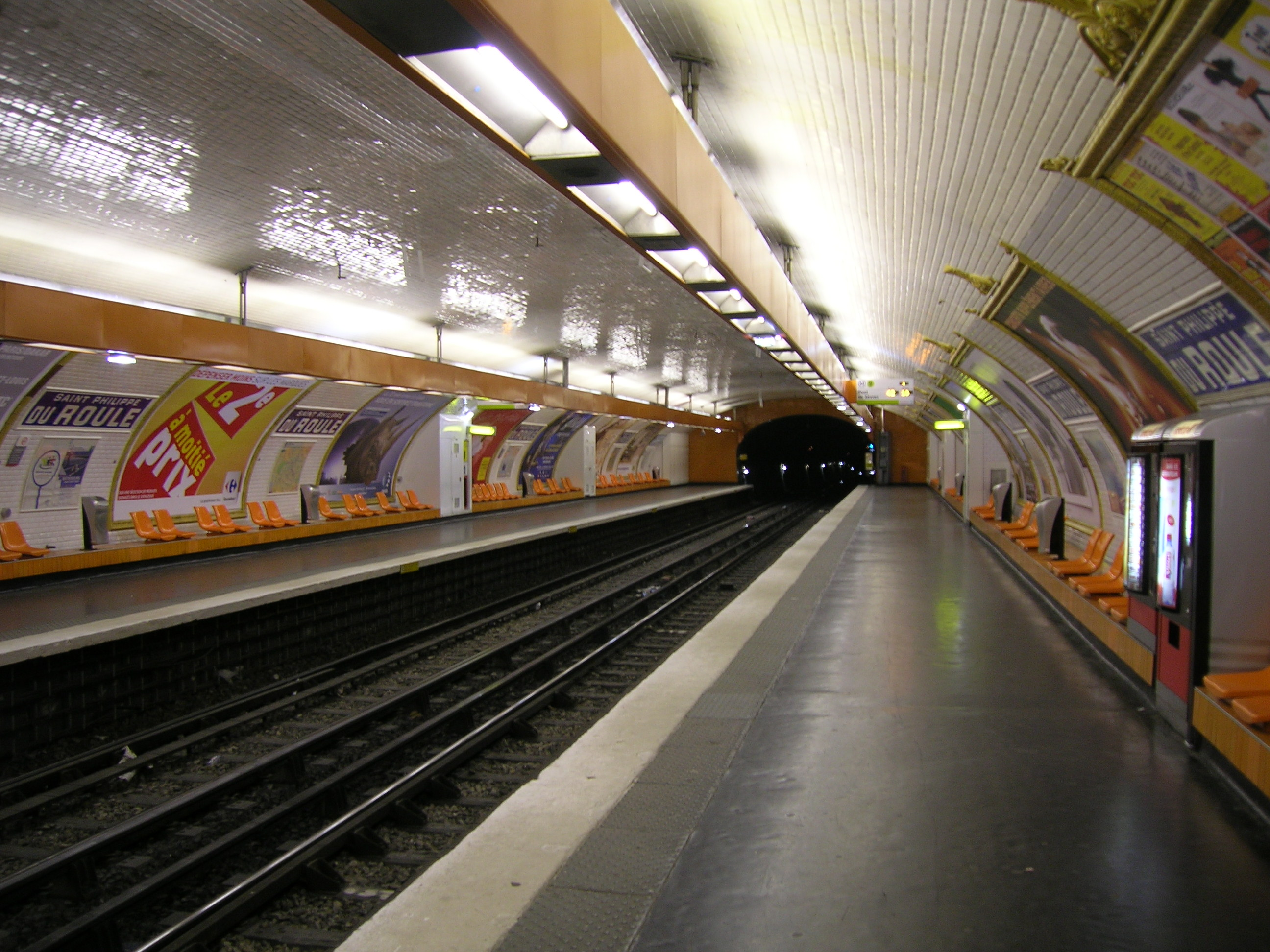 Station Saint Philippe du Roule au niveau des quais